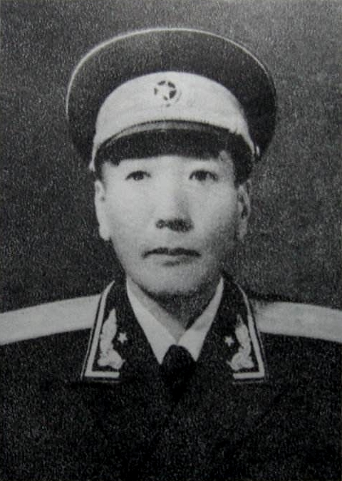 桑颇·才旺仁增